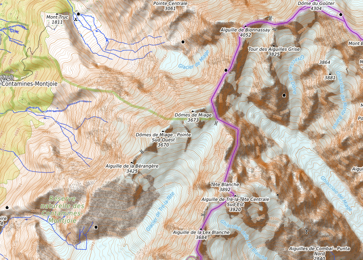 carte réalisée sur umap This map may be incomplete, and may contain errors. Don't rely solely on it for navigation.